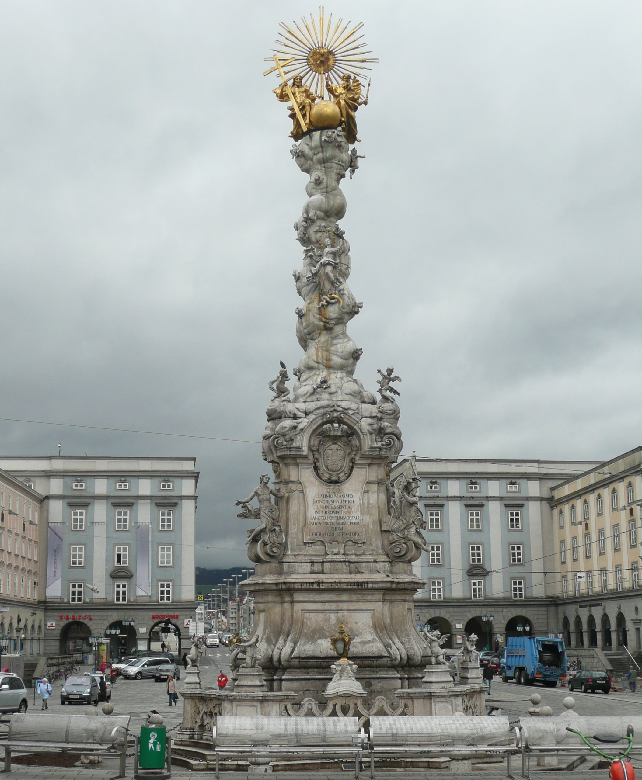 Dreifaltigkeitssäule